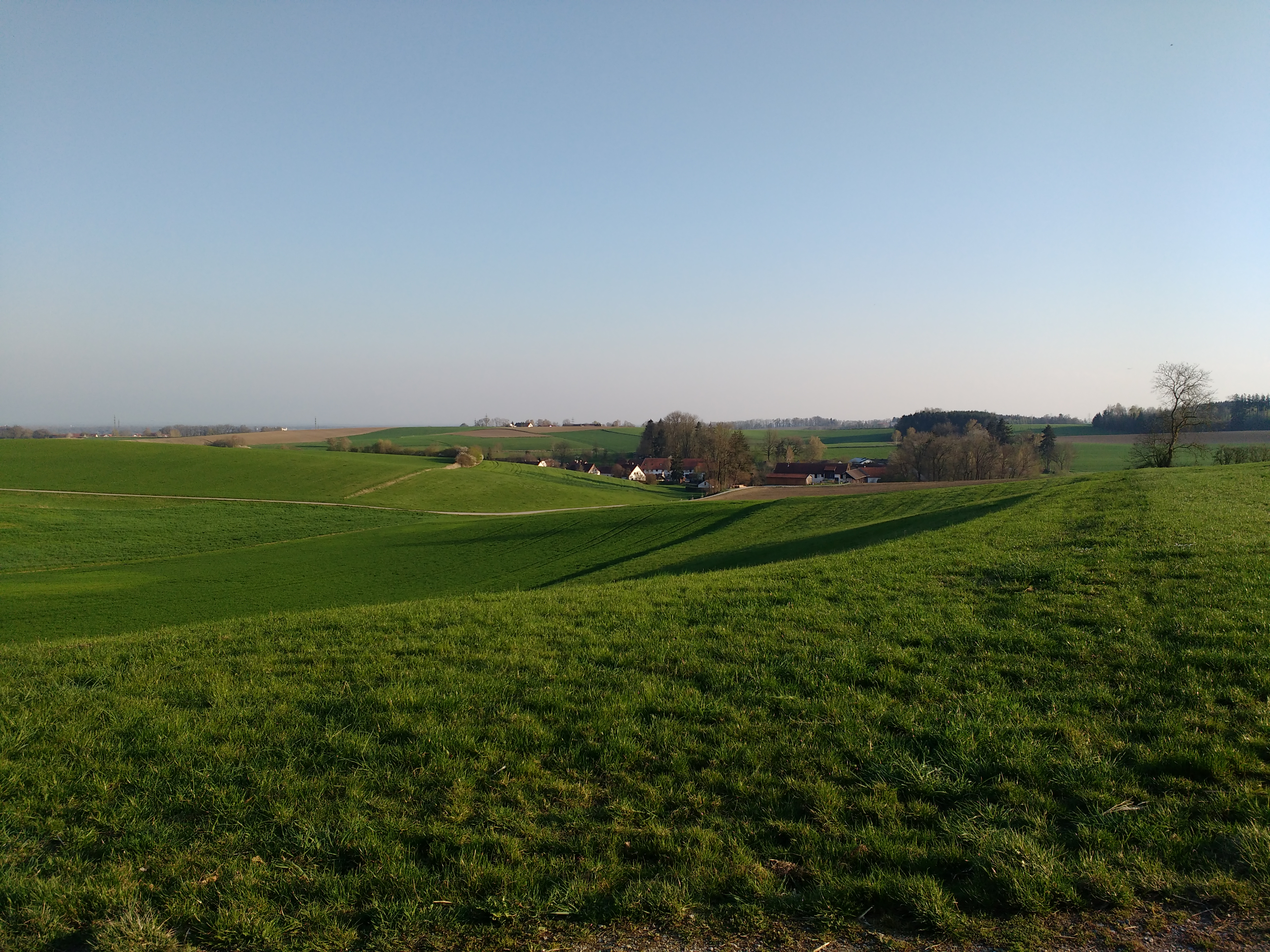 Der Freisinger Ortsteil Kleinbachern